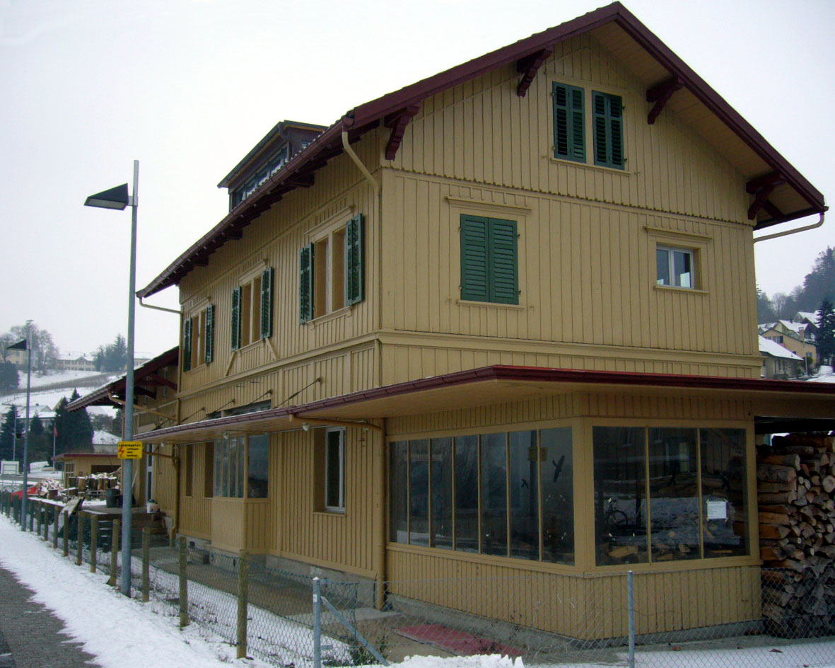 Altes Bahnhofgebäude in Mannenbach (TG), Schweiz